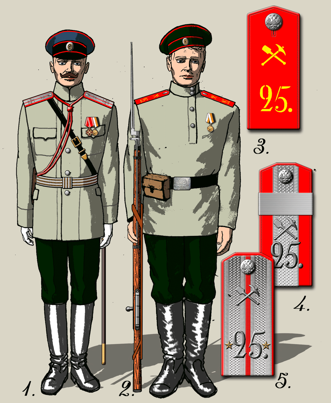 Российская Империя. Российская Императорская армия. Форма одежды чинов 25-го сапёрного батальона во время празднования 300-летия династии Романовых в Костроме 20 мая (2 июня) 1913г.: 1. Форма одежды офицеров. 2. Форма рядовых и унтер-офицеров. 3. Погон рядового. 4. Погон фельдфебеля-подпрапорщика. 5. Погон подпоручика. Источник исходных изображений: Празднование трёхсотлетия царствования Дома Романовых в Костромской губернии. Издание Костромской Губернской Учёной Архивной комиссии. Составил Член Совета комиссии Н.Н. Виноградов. Кострома, Губернская типография, 1914 г.